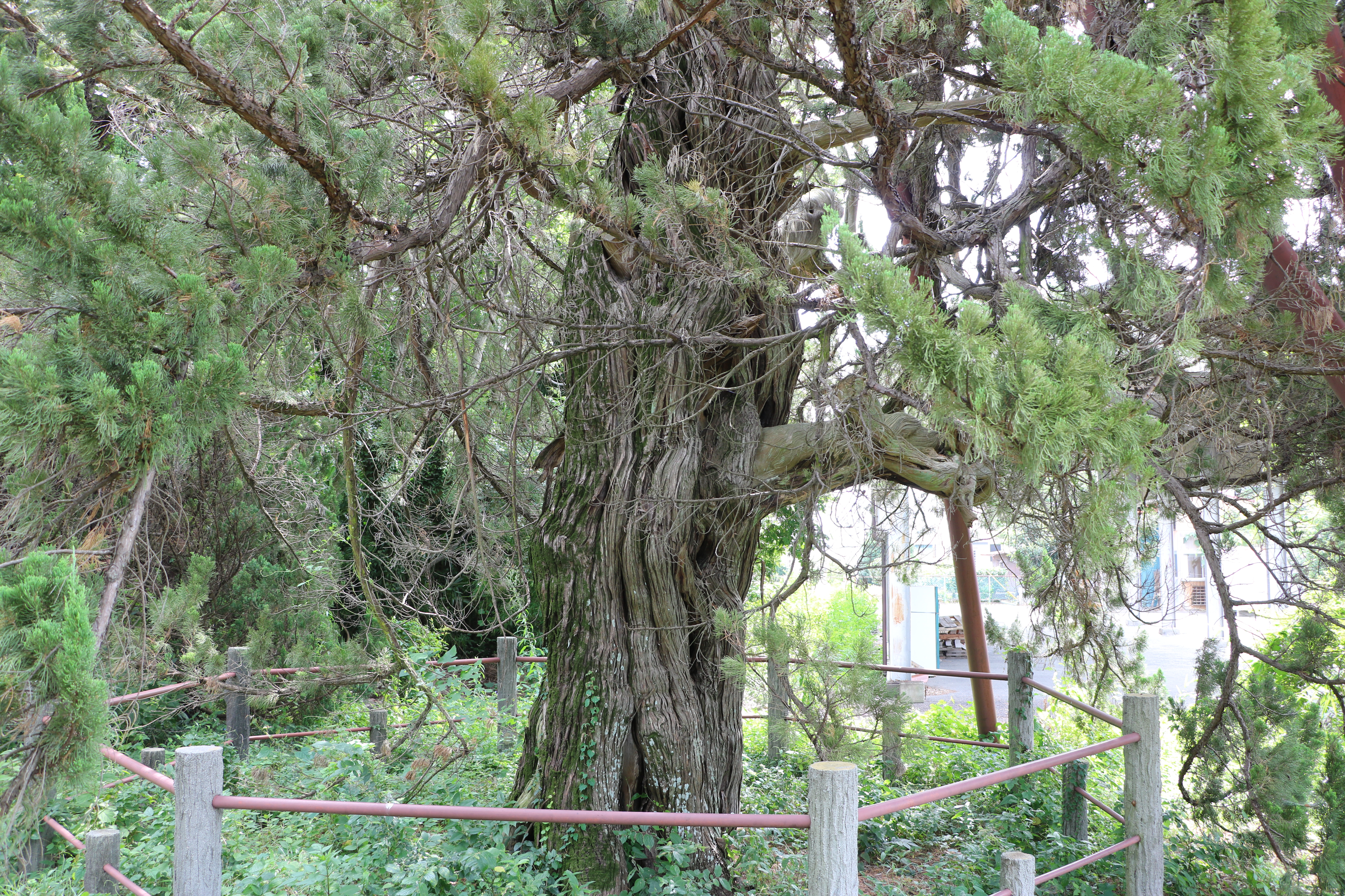 古長禅寺のビャクシンの南東隅の木（国指定天然記念物、山梨県南アルプス市）